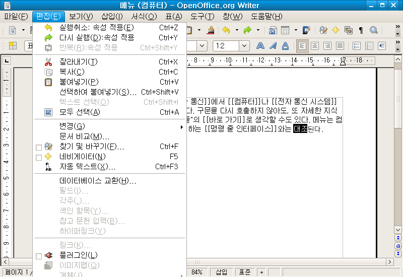 오픈오피스 2.3 메뉴